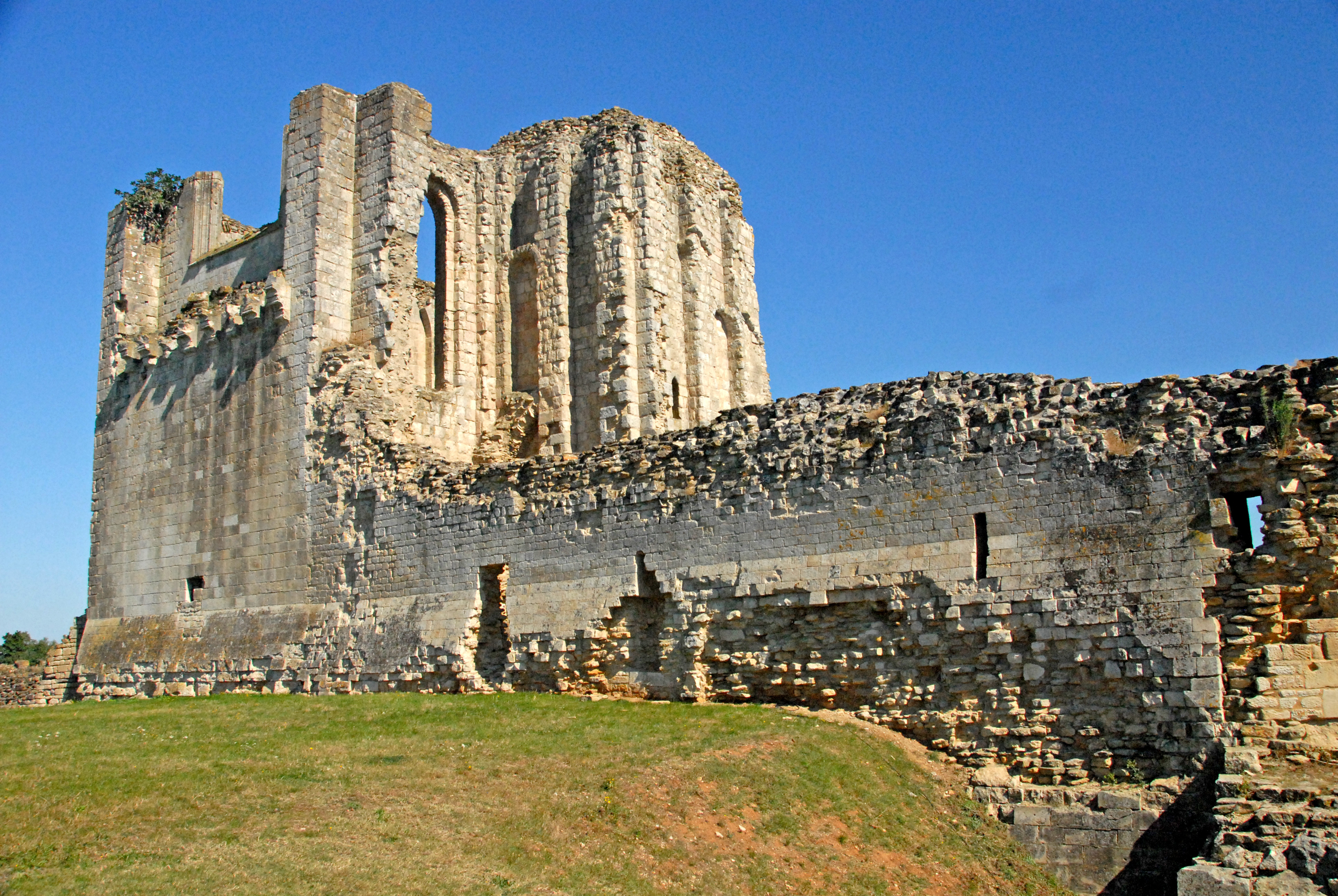 Maillezais, Westwerk, Vormauerun d. Hugenotten